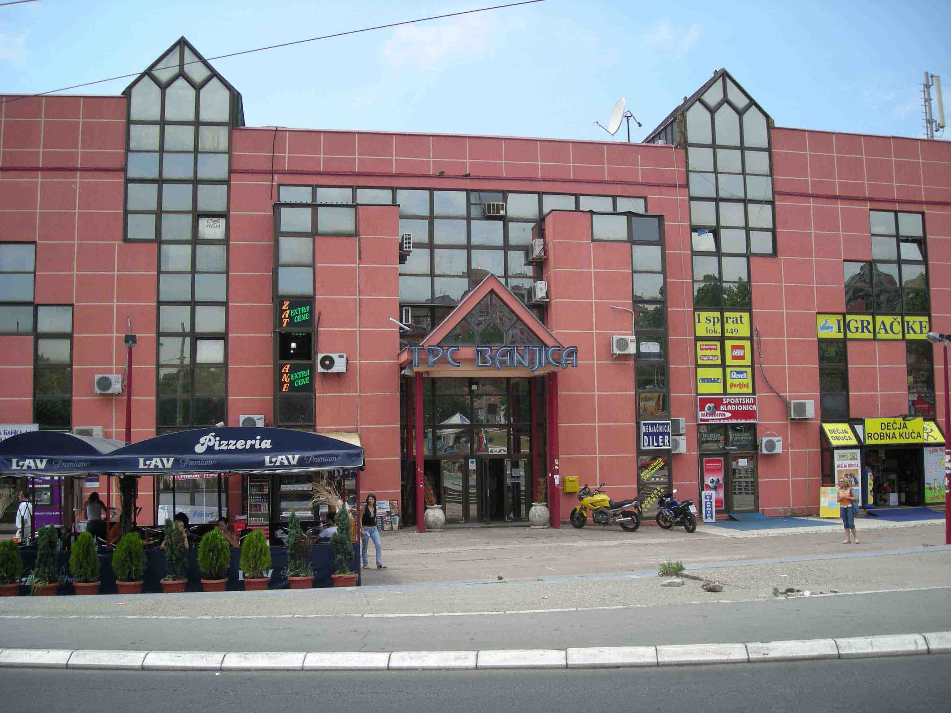 Тржни центар Бањица